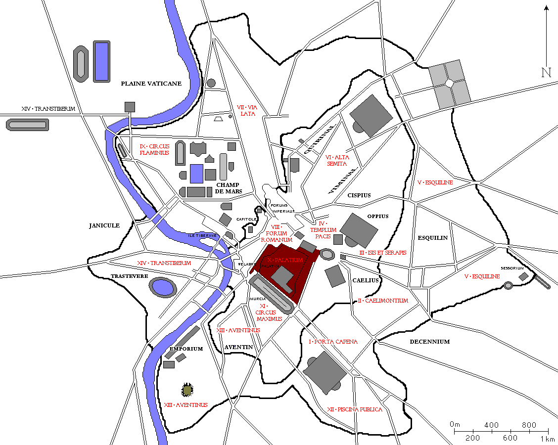 Plan de Rome avec la dixième région des 14 régions d'Auguste